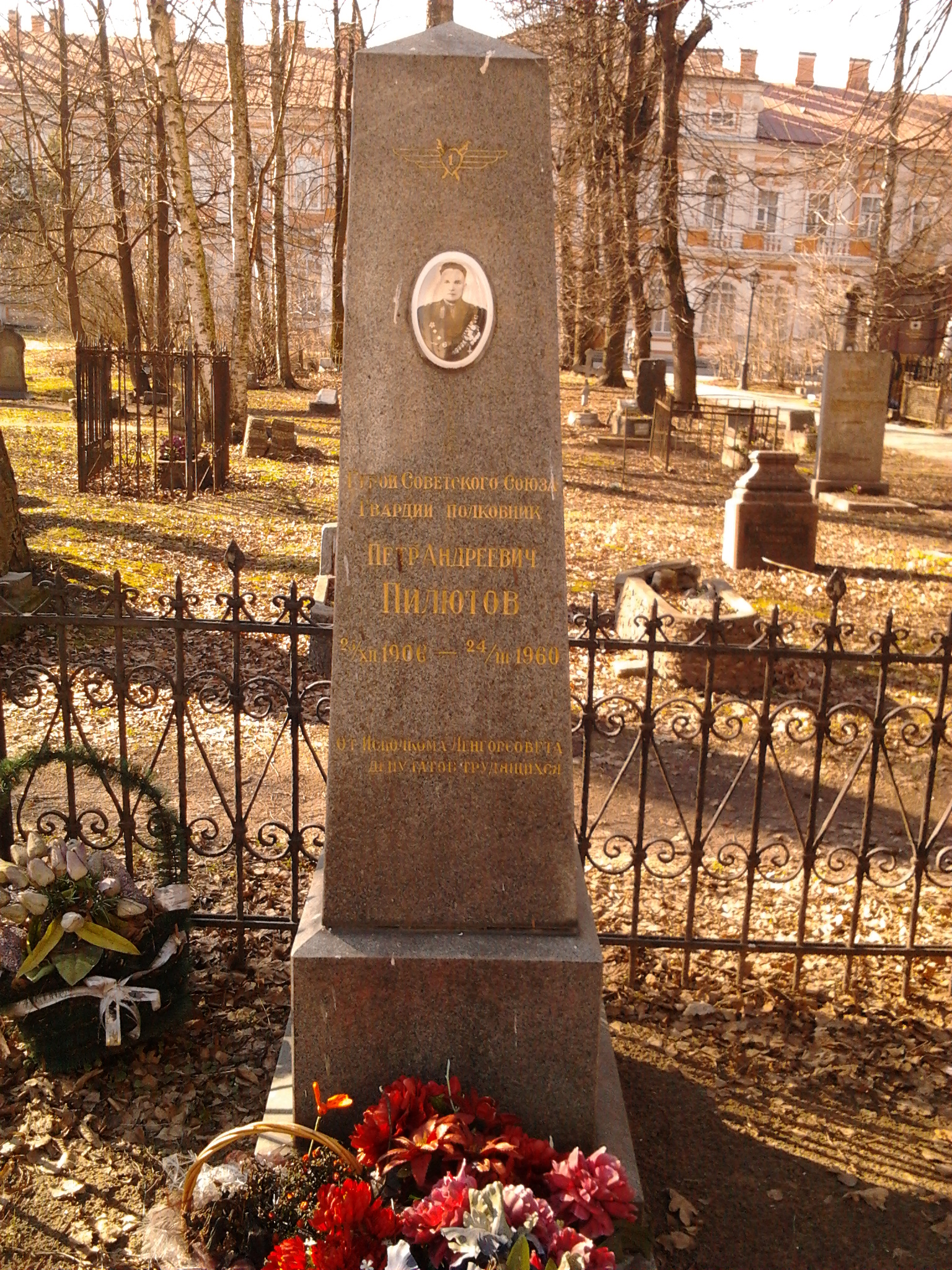 Надгробие П. А. Пилютова на Казачьем кладбище Александро-Невской лавры в Санкт-Петербурге.